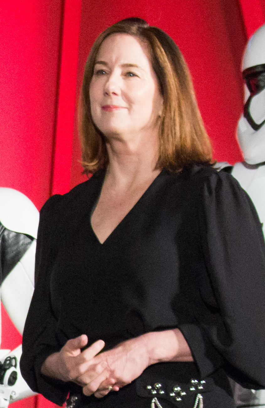 スター・ウォーズ/最後のジェダイ ジャパン・プレミア レッドカーペット ライアン・ジョンソン マーク・ハミル アダム・ドライバー キャスリーン・ケネディ